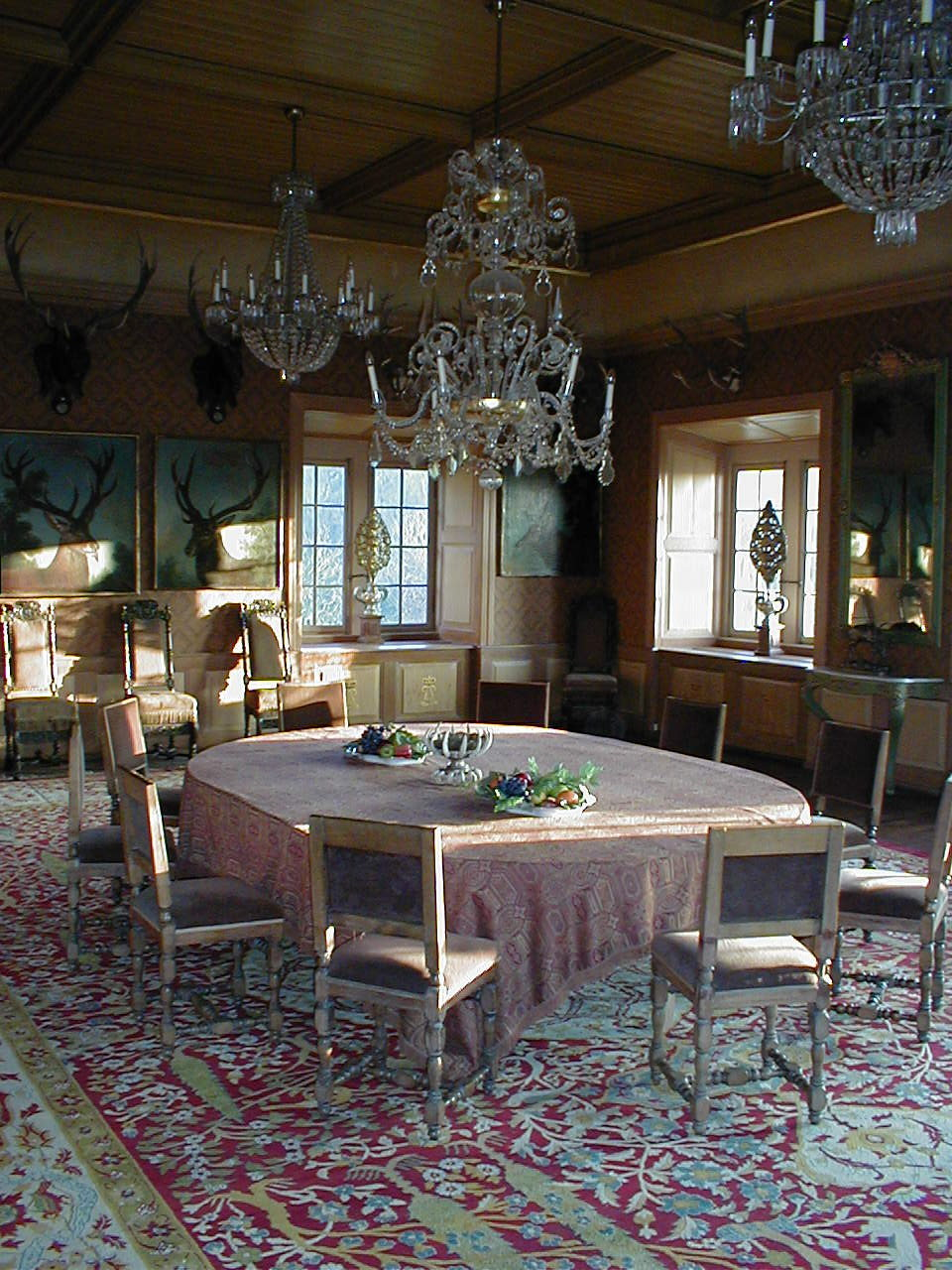 Gründerzeitlicher Hirschsaal im Jagdschloss Kranichstein